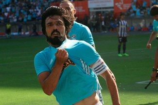 TI